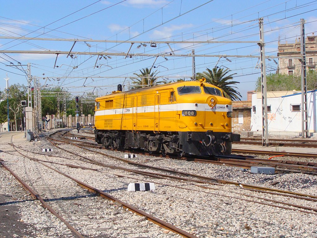 Locomotora 316.008 (1608)COMSA estacionada a l'estació de Tarragona.